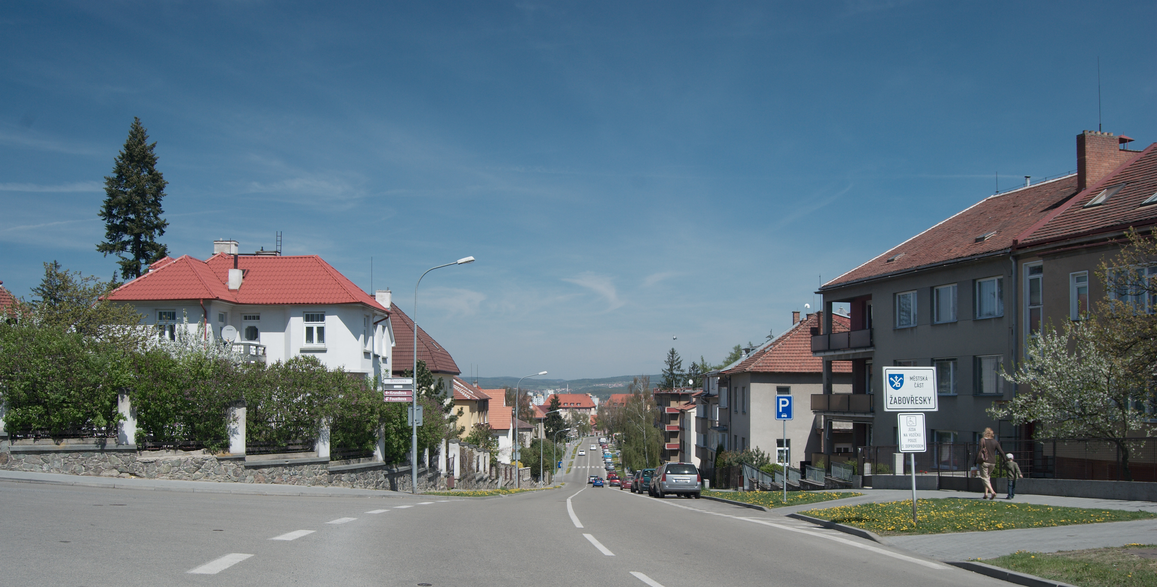 Brno-Žabovřesky - někdejší Česká úřednická čtvrť